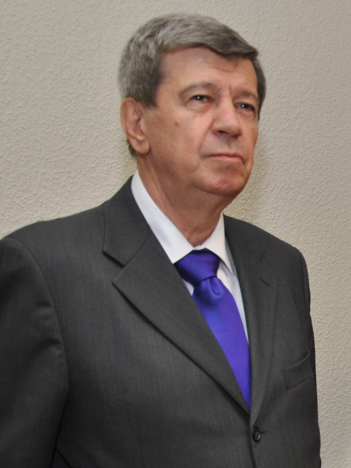 Eduard Kukan